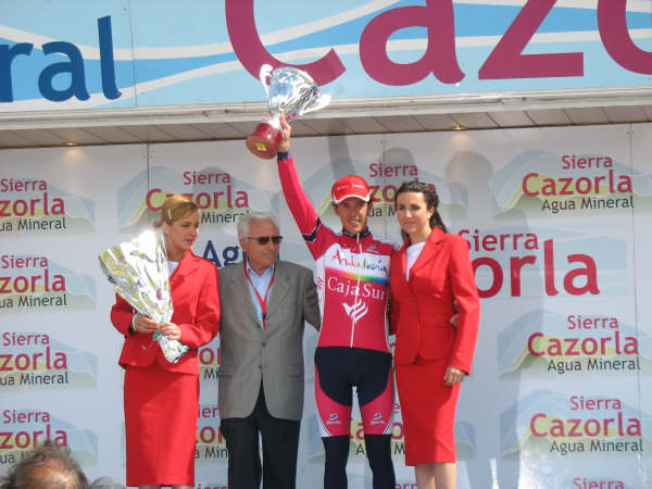 Luis Pérez en el podium de Navacerrada